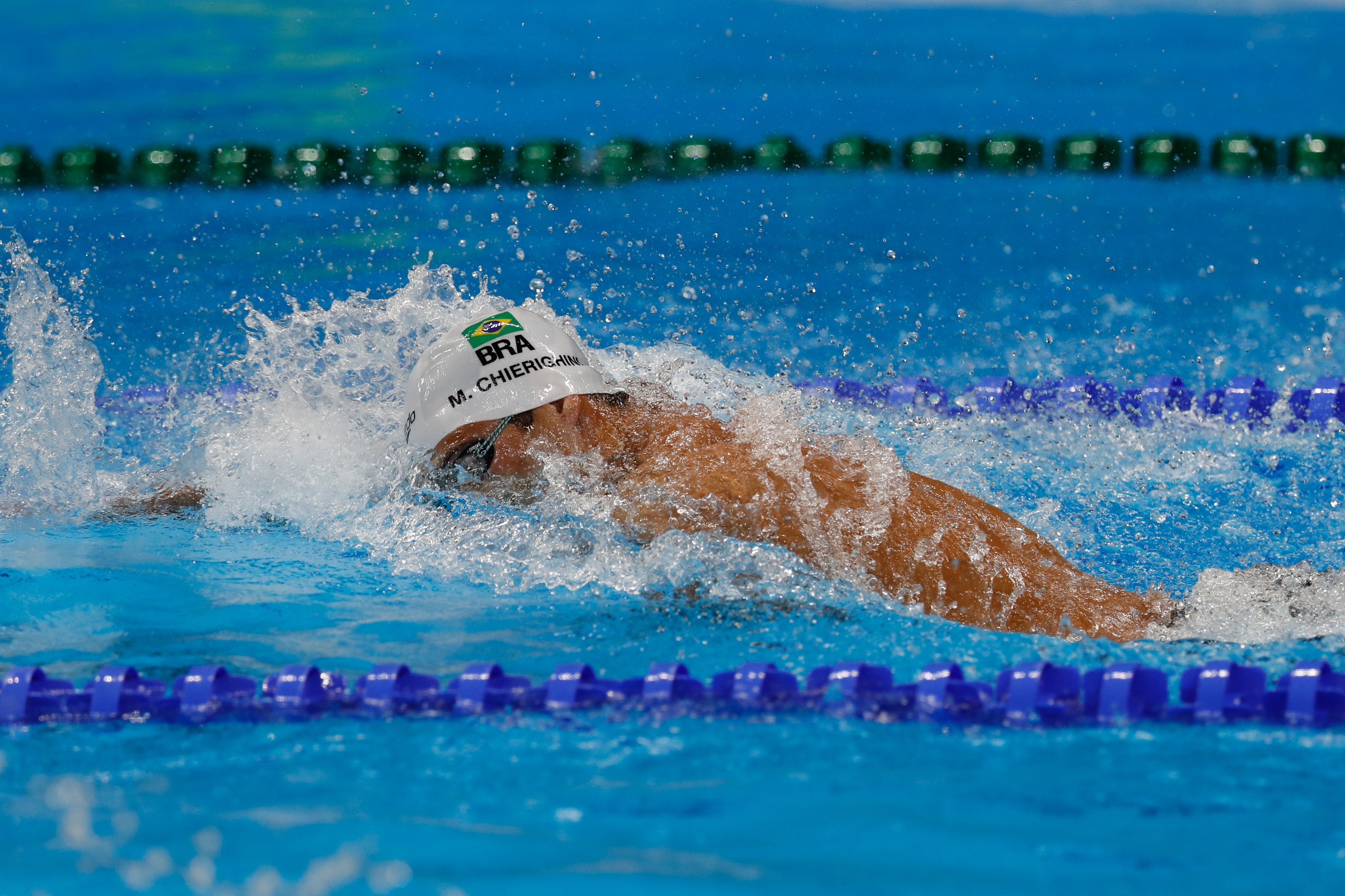 Rio de Janeiro - Nadadora norte-americana Katie Ledecky bate recorde mundial e leva medalha de ouro nos 400m livre nos Jogos Olímpicos Rio 2016 (Fernando Frazão/Agência Brasil)